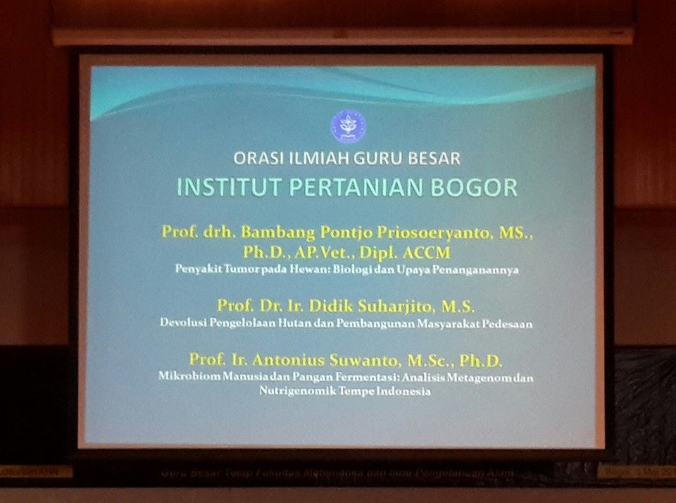 Judul Orasi Ilmiah Guru Besar Institut Pertanian Bogor